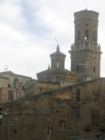 Tudela, España